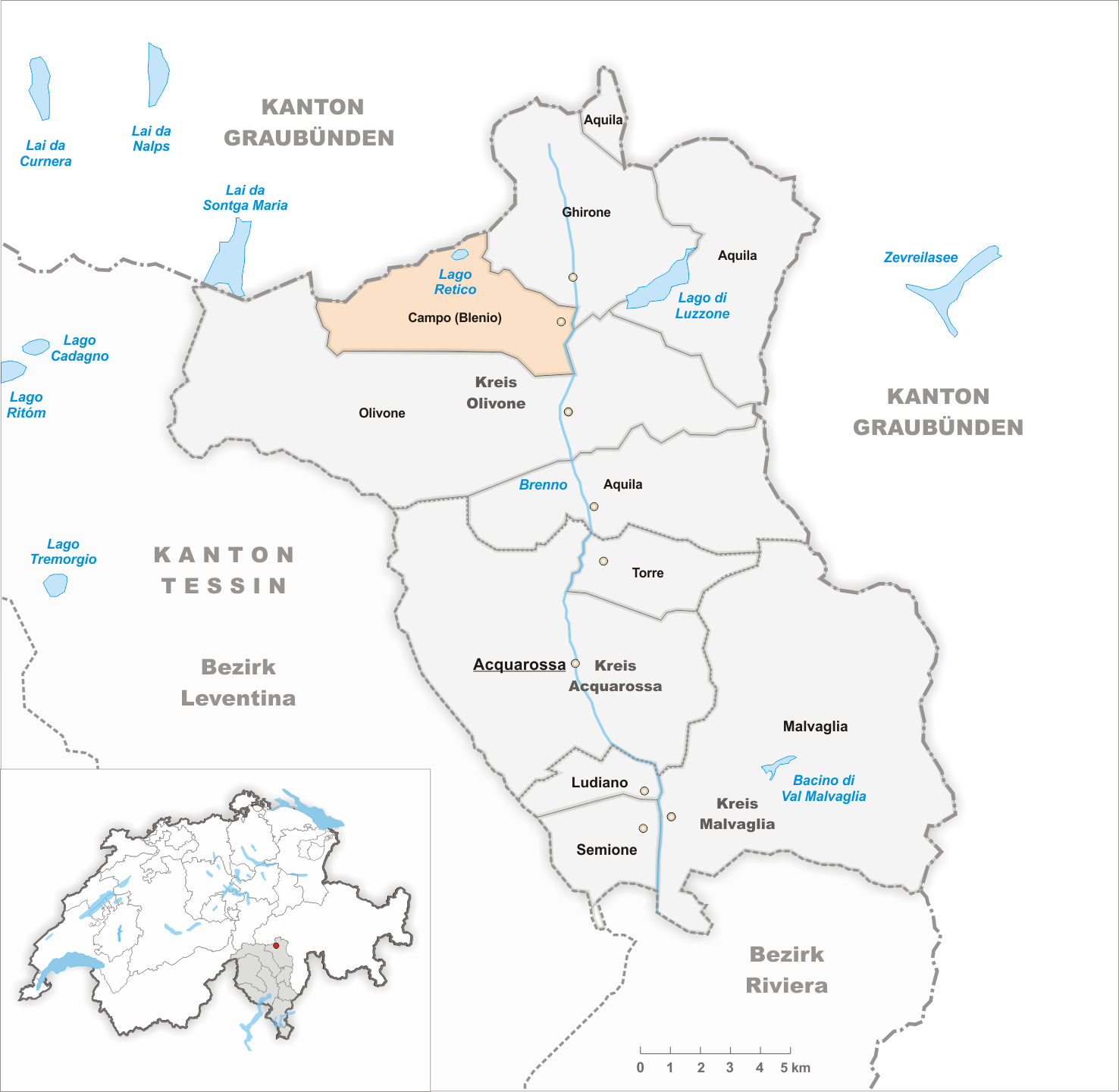 Municipality Campo